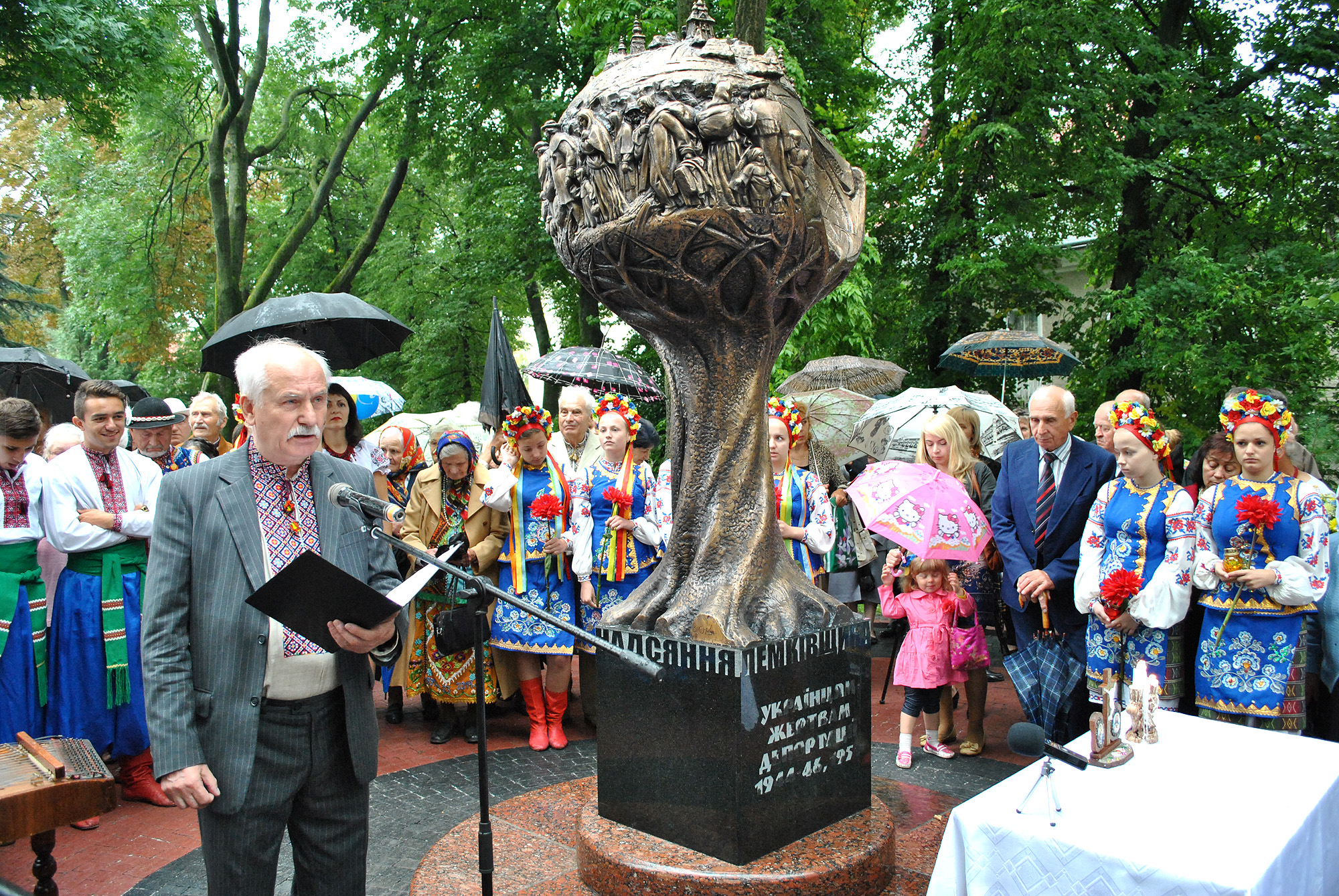 Відкриття пам'ятника українцям-жертвам депортації 1944-1946, 1951 років (м. Тернопіль). Виступає редактор «Дзвонів Лемківщини», директор Тернопільського художнього музею Ігор Дуда.